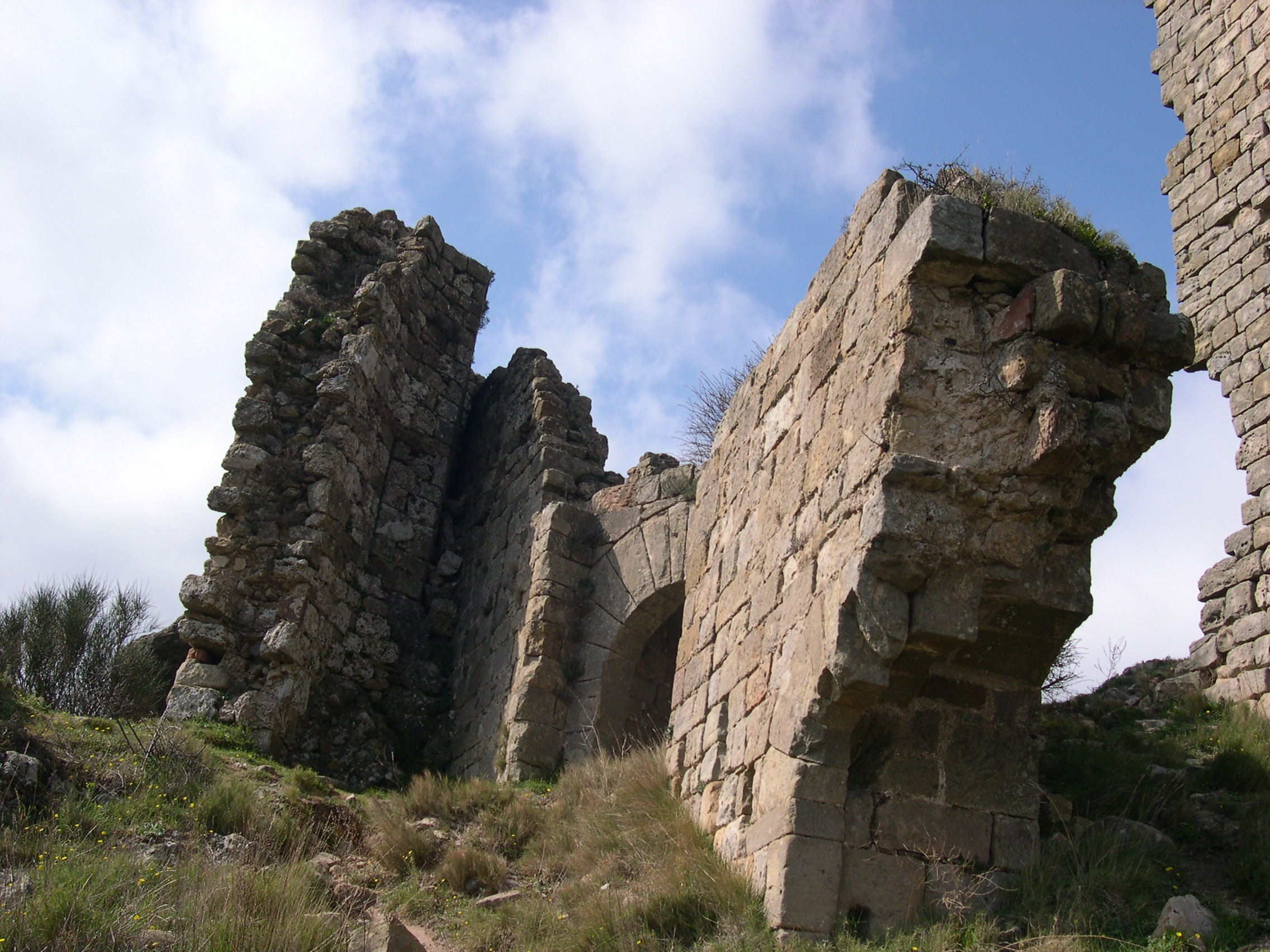 Mérifons - Château de Malavieille (détail)